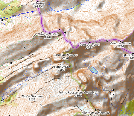 carte réalisée sur umap This map may be incomplete, and may contain errors. Don't rely solely on it for navigation.